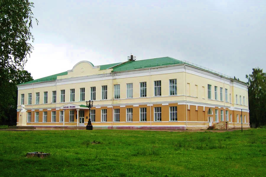 Liceo Novgorod-Severskij